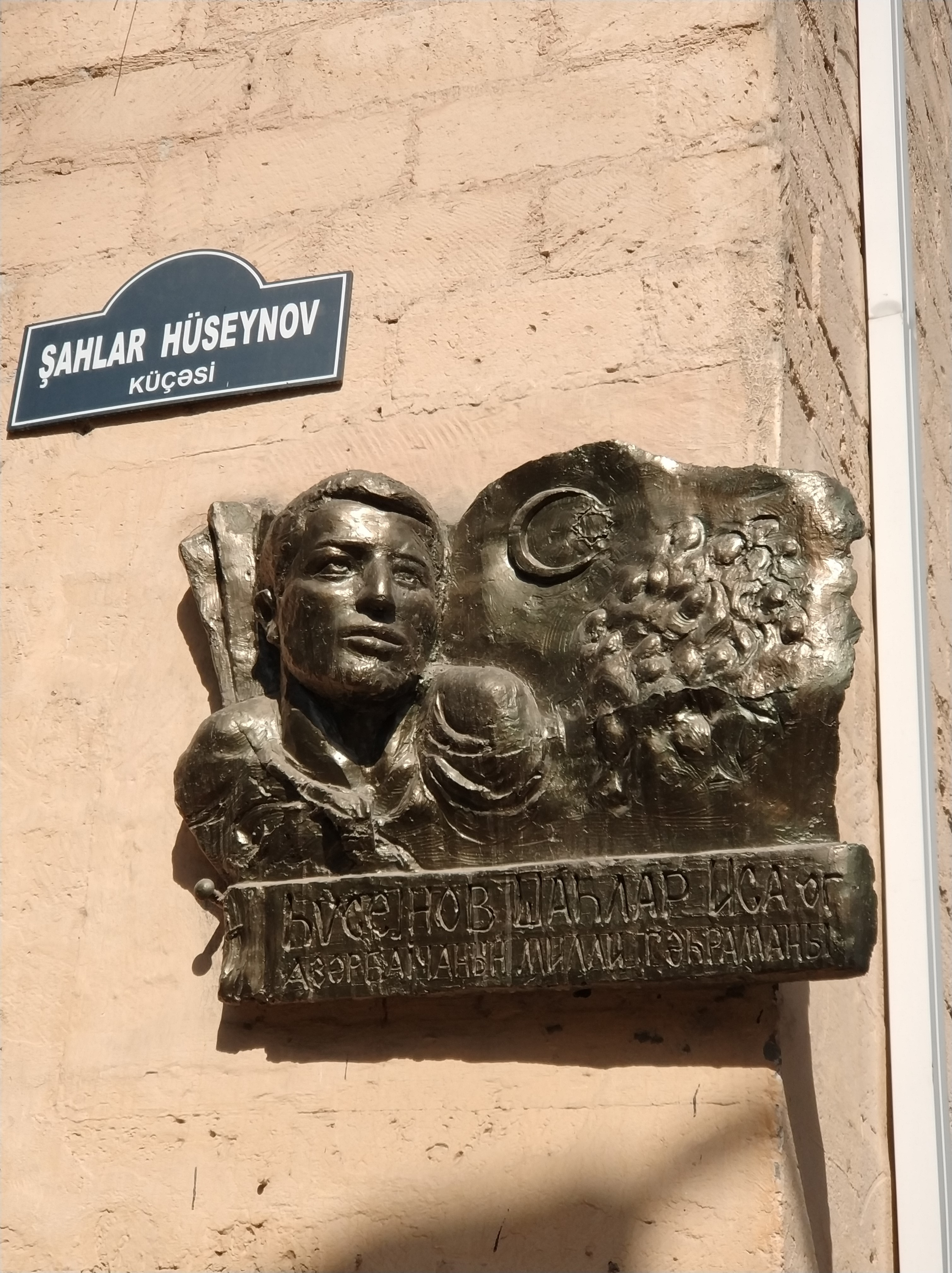 Lovhe